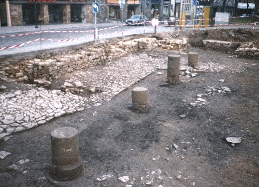 Neustädter Rathaus Warburg - Ausgrabungen 1984 Details